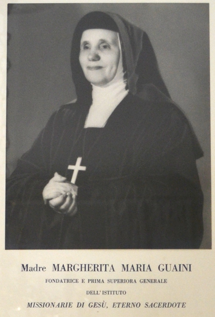 Matka Margherita Maria Guaini (1902-1994)